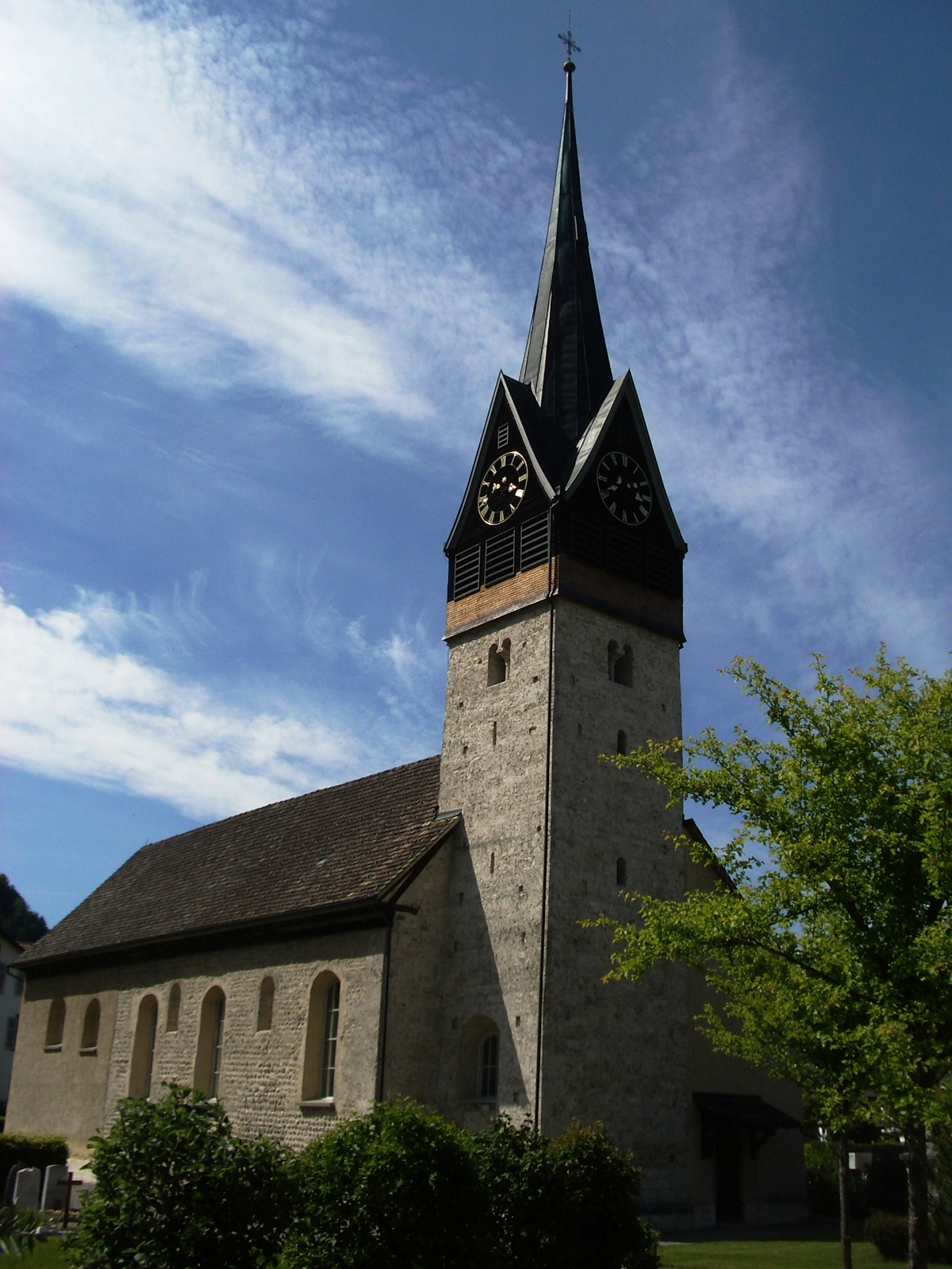 Dussnang TG (Fischingen), Switzerland